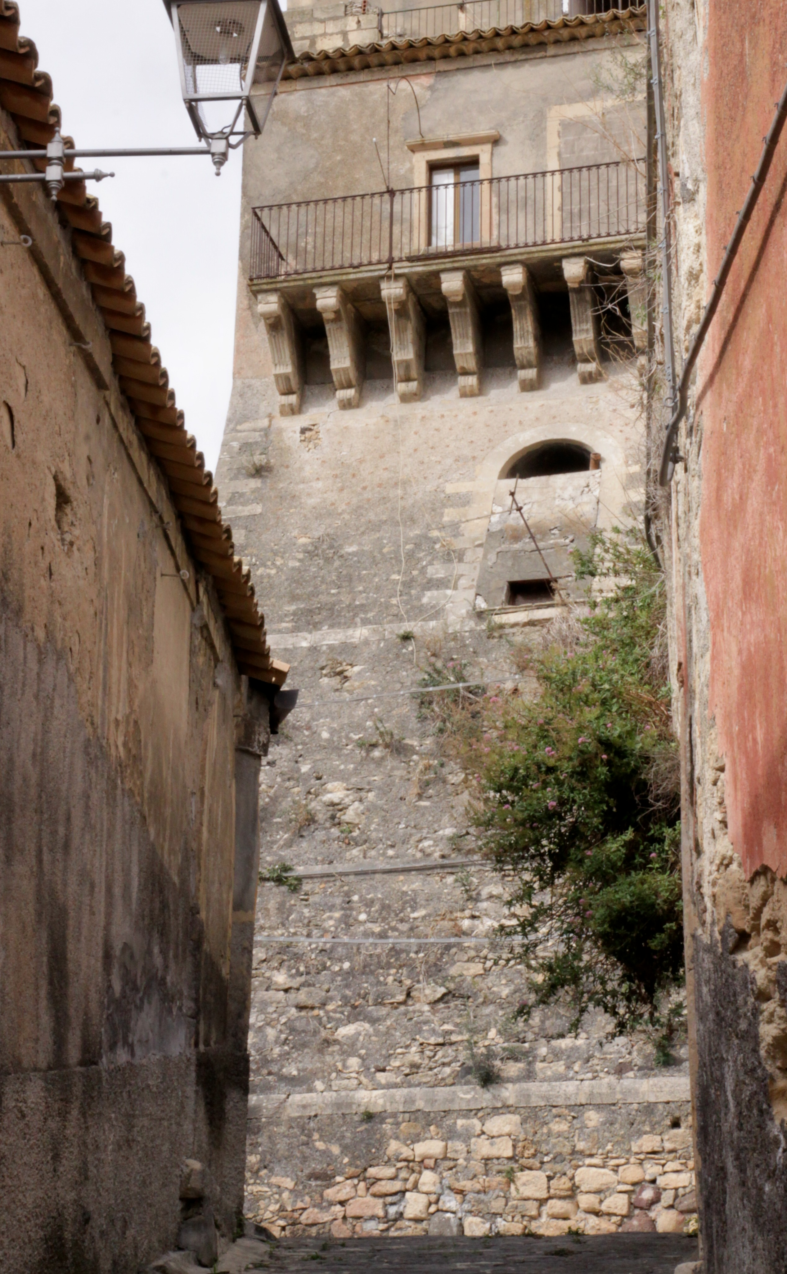 Scorcio del bastione della torre Sud del castello di Militello.